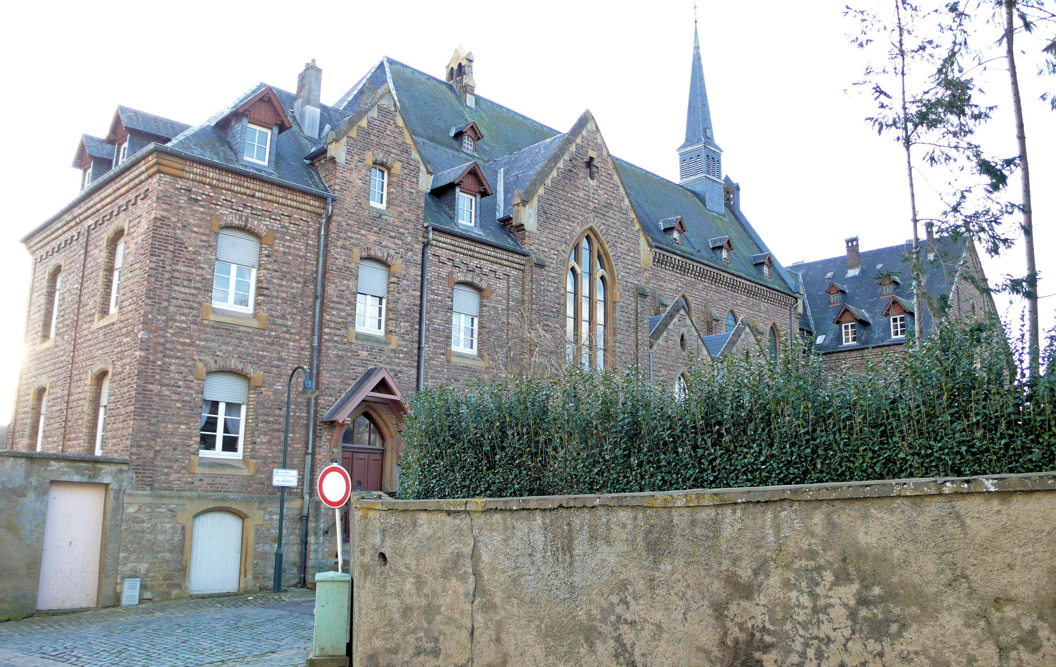 Klouschter Peppeng